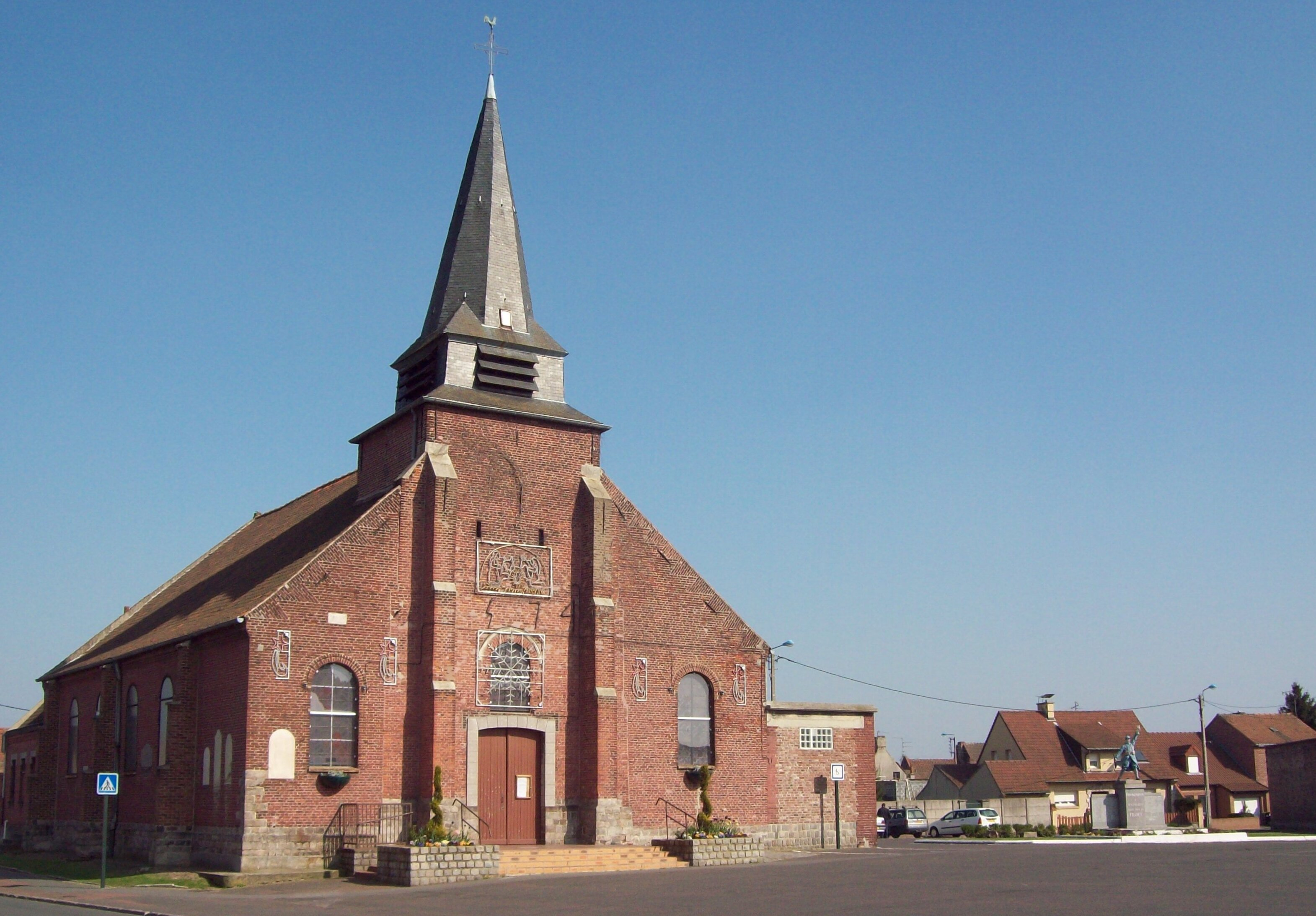 L'église d'Evin Malmaison